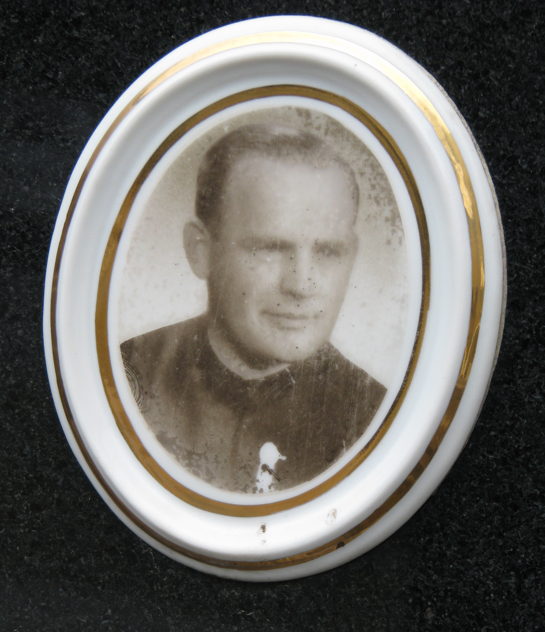 Fotografie Metoděje Bystřického z jeho náhrobku na Val. Bystřici